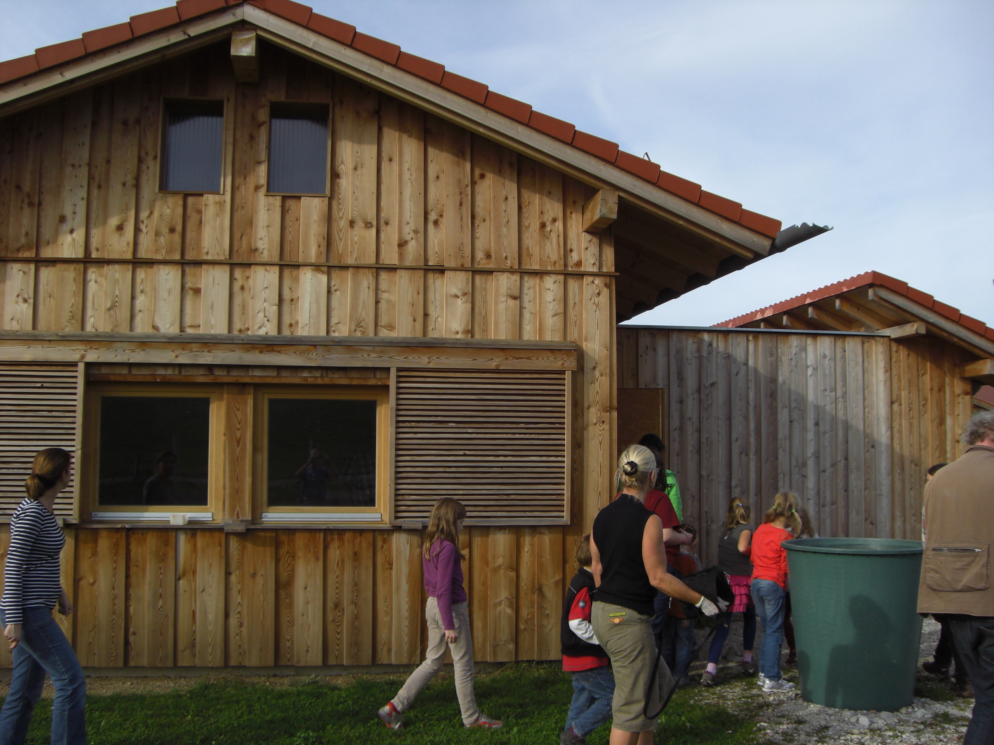 Greifvogelauffangstation in Otterfing, Landkreis Miesbach